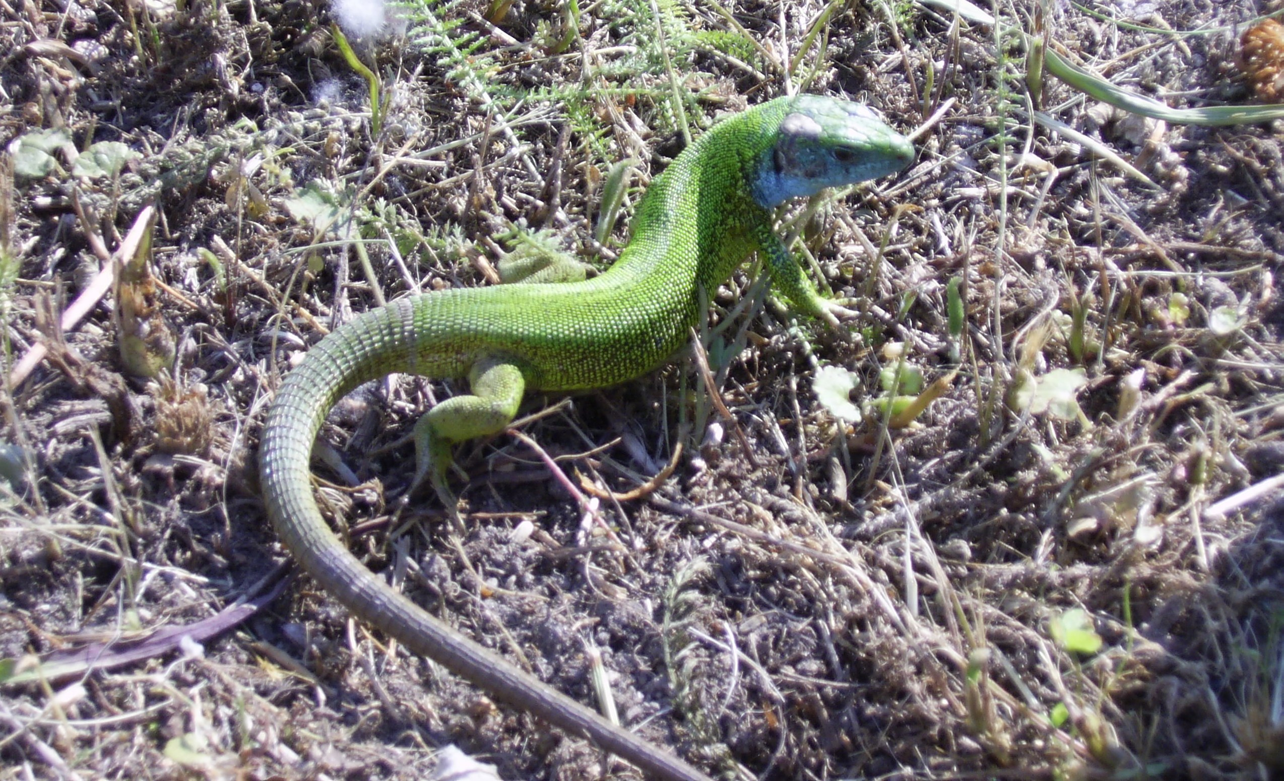 Eine männliche Östliche Smaragdeidechse (Lacerta viridis), aufgenommen in der Burg Devín, Slowakei .